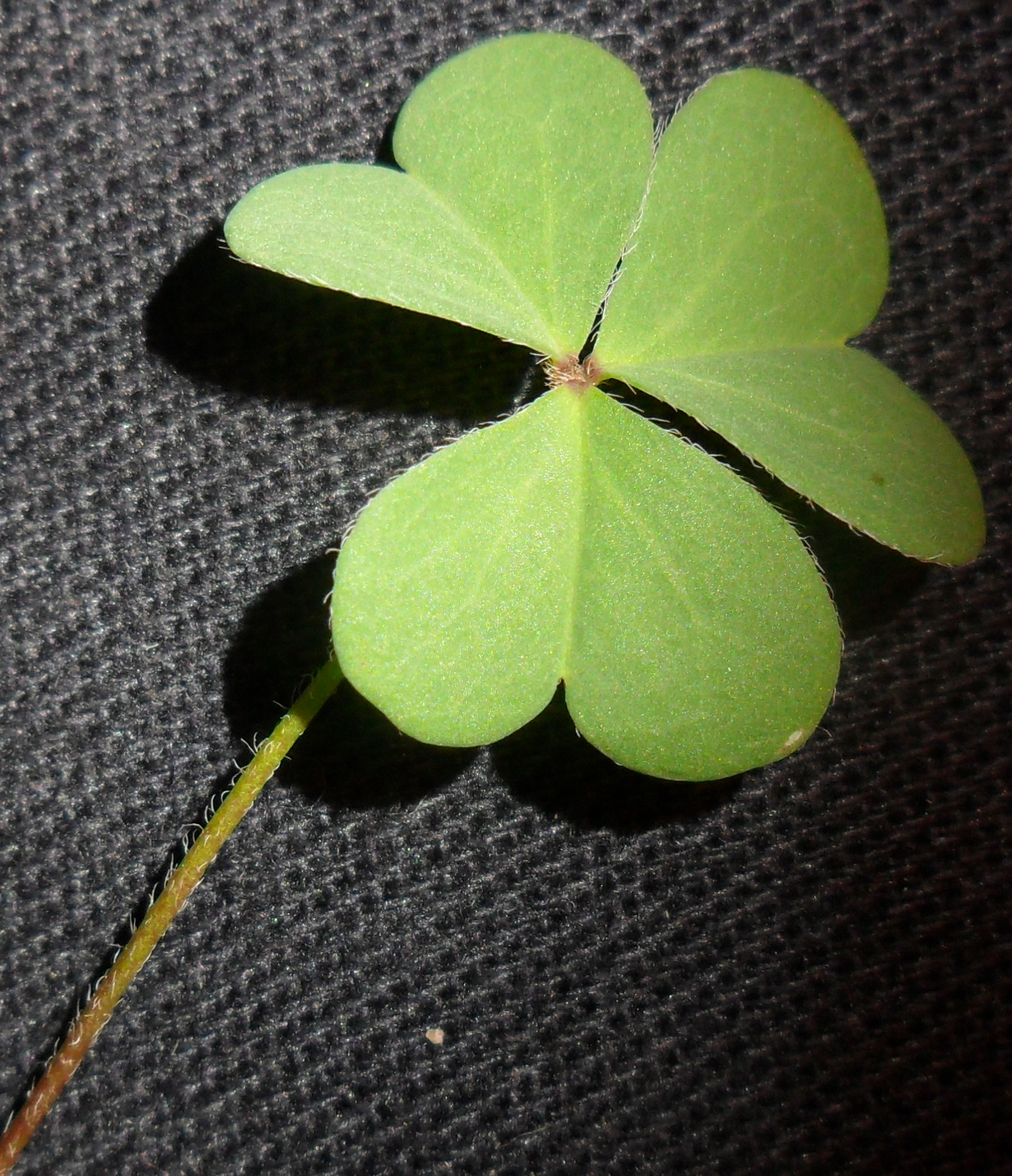 Flor trifoliolada típica do gênero Oxalis